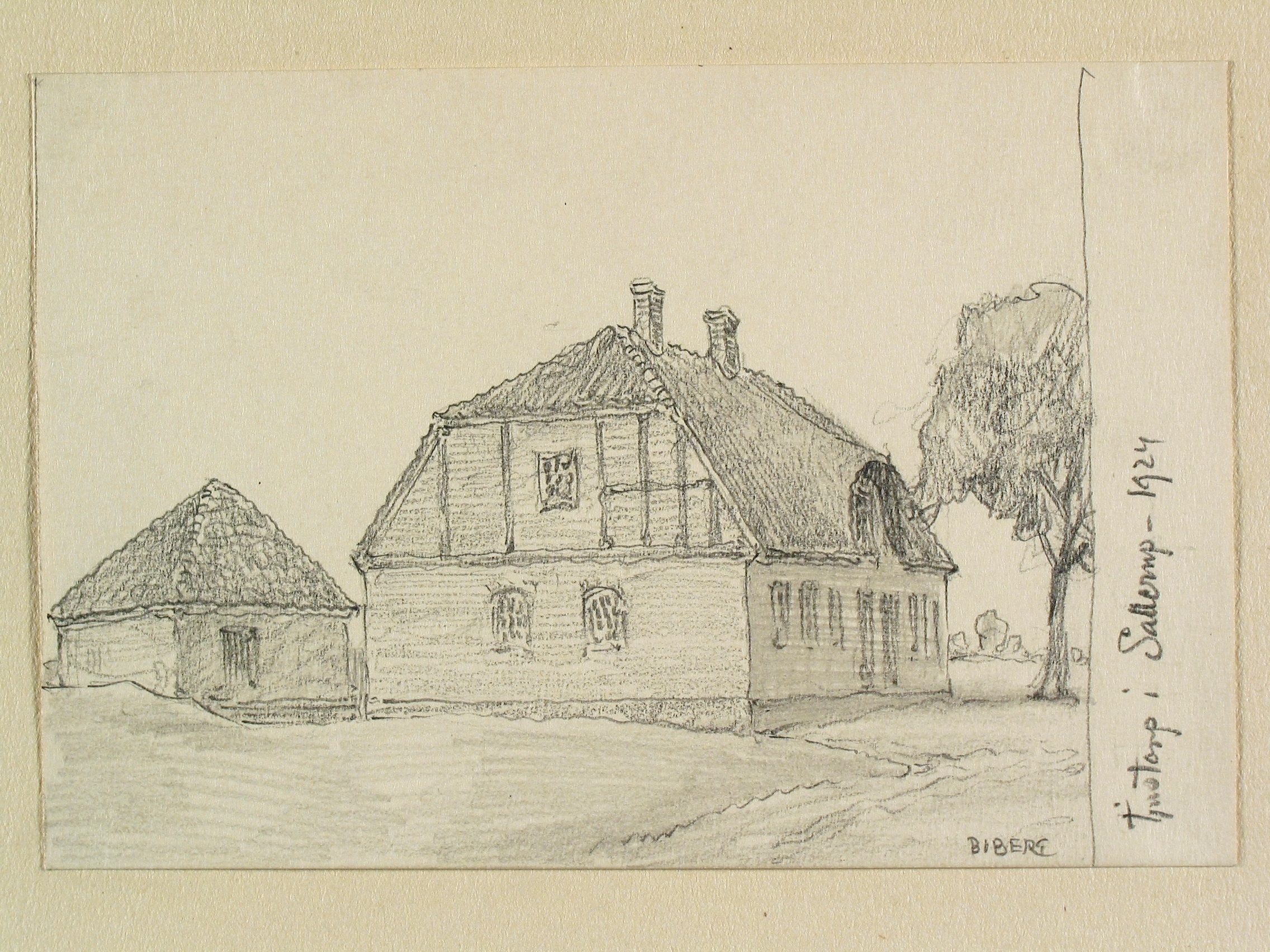 Skåne, Oxie hd., Sallerups sn., Tjustorp. Teckning av Ferdinand Boberg Depicted place: Tjustorp (Ort), Oxie (Härad), Malmöhus County (Q533915)